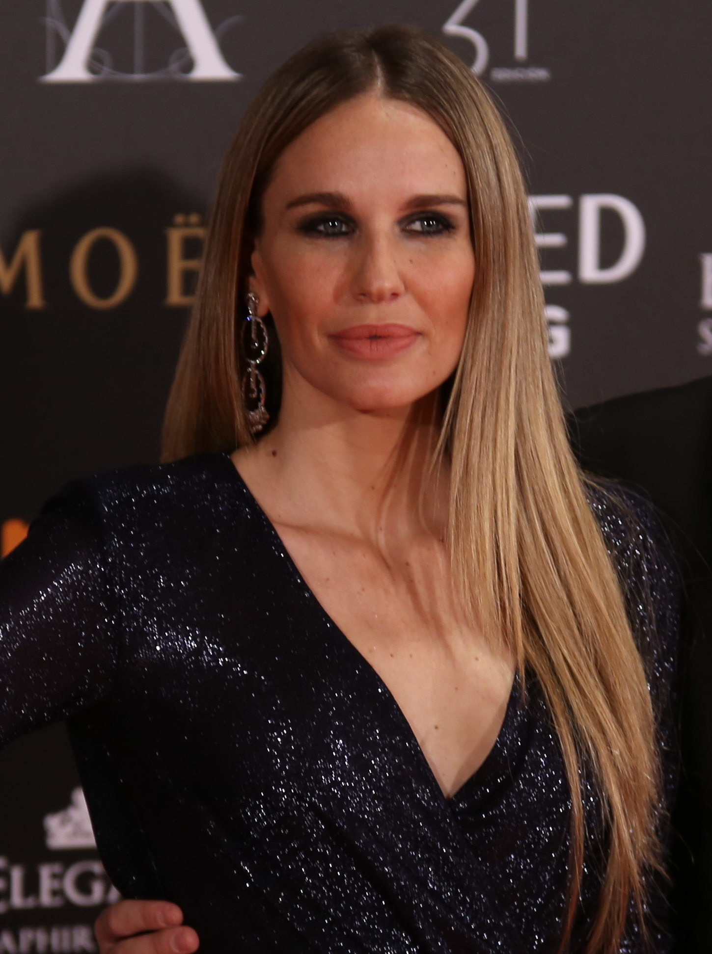 Premios Goya 2017